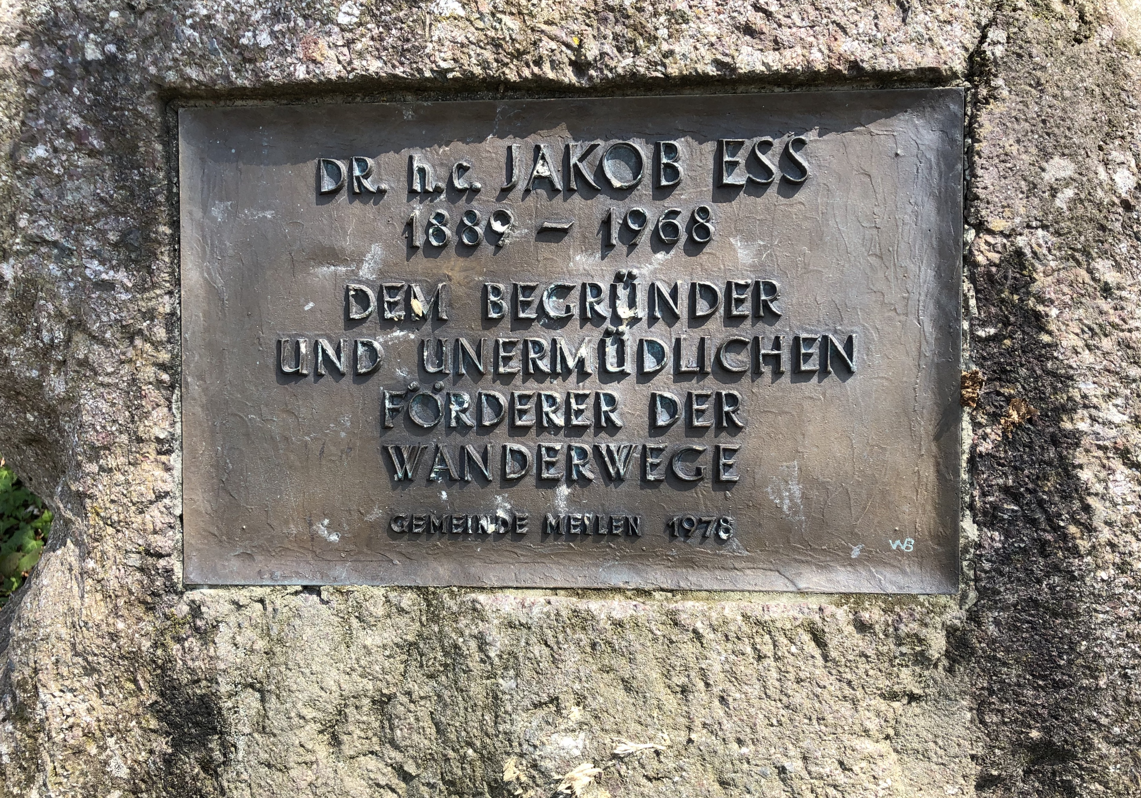 Tafel am Gedenkstein beim Vorderen Pfannenstiel für Jakob Ess, Begründer der schweizerischen Wanderwege